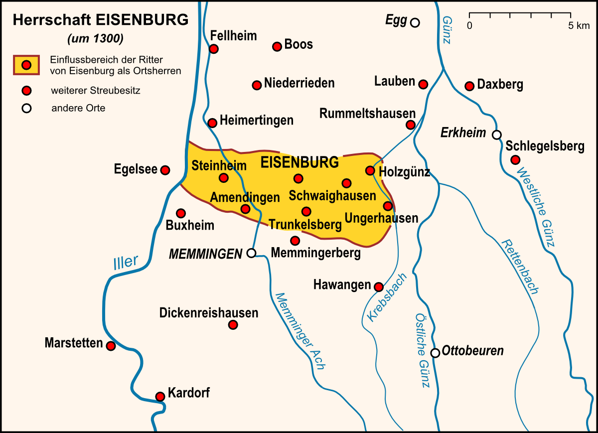 Karte der Herrschaft Eisenburg mit ihrem größten Einflussbereich um 1300